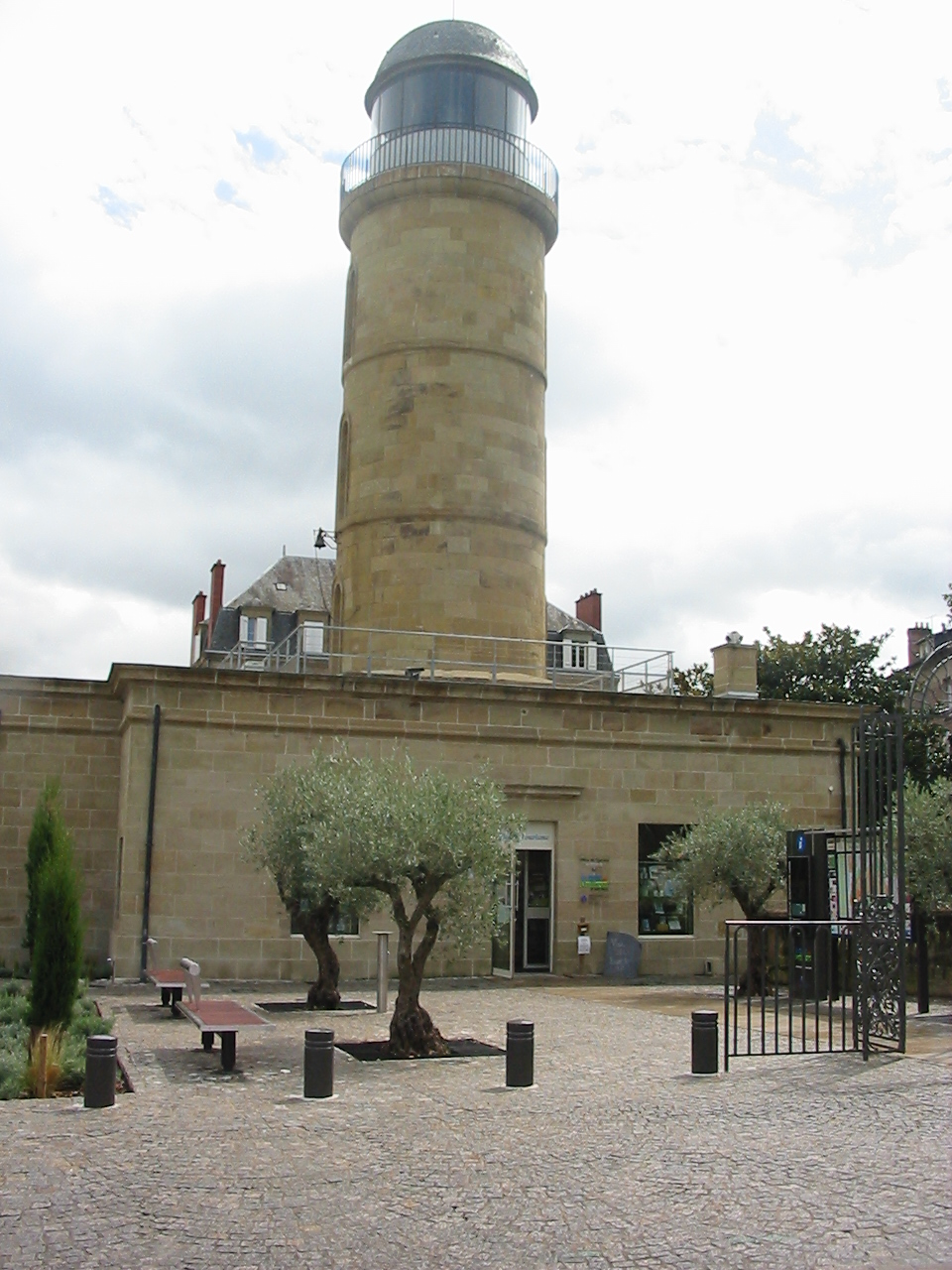 Château d'Eau, élevé au XIX è siècle, surmontant l'office de tourisme de Brive-la-Gaillarde, Corrèze, France